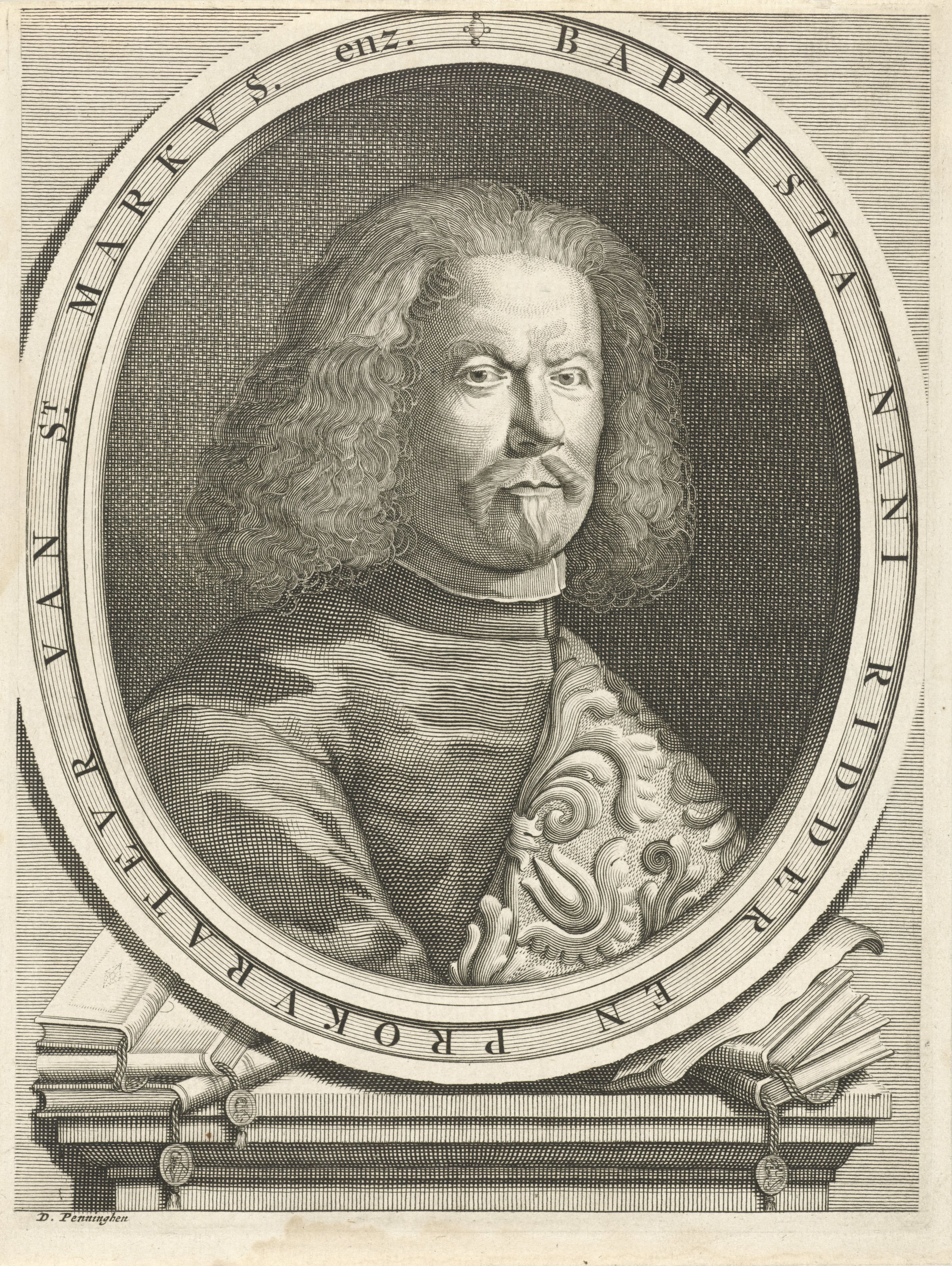 IdentificatieTitel(s): Portret van Baptista NaniObjecttype: prent Objectnummer: RP-P-1909-4541Catalogusreferentie: Hollstein Dutch 3Opschriften / Merken: verzamelaarsmerk, verso, gestempeld: Lugt 2228Omschrijving: Portret van de Venetiaanse schrijver Baptista Nani. De omlijsting van zijn portret rust op een piëdestal Waar: op allerlei boeken.VervaardigingVervaardiger: prentmaker: Daniël met de Penningen (vermeld op object)Plaats vervaardiging: AmsterdamDatering: 1685 - 1696Fysieke kenmerken: gravureMateriaal: papier Techniek: graveren (drukprocedé)Afmetingen: plaatrand: h 195 mm × b 147 mmOnderwerpWat: bookWie: Giovan Battista NaniVerwerving en rechtenVerwerving: aankoop 1905Copyright: Publiek domein